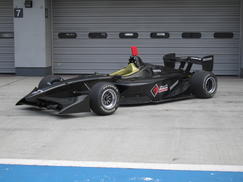 Swift製 '09Formula Nippon用 シェークダウンテスト（at 富士スピードウェイ）にて撮影